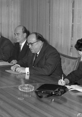 Title: Bonn, BMWi, Minister aus Irak Extra information: Im Bild (v.r.n.l.): Dolmetscherin des Auswärtigen Amts, Staatssekretär Prof. Dr. Müller-Armack, BWM, MinRat Dr. Kroog, BWM, MinDirigent Dr. Neef, BWM, MinRat Kling, BWM, MinDirigent Richter, BWM, links am Tisch Schmitz-Lenders, Salman, Suleyman People in the image: Neef, Fritz Dr.: Staatssekretär im Wirtschaftsministerium, Bundesrepublik Deutschland * Salman, Mohamed: Minister für Ölindustrie, Irak * Müller-Armack, Alfred Prof. Dr.: 1901-1978; NSDAP, Staatssekretär im Bundeswirtschaftsministerium, Bundesrepublik Deutschland (GND 118585282) Factual corrections and alternative descriptions are encouraged separately from the original description. Additionally errors can be reported at this page to inform the Bundesarchiv. Original historic description: Empfang des irakischen Minister für Ölangelegenheiten, Mohamed Salman, durch St. Müller-Armack im Wirtschaftsministerium